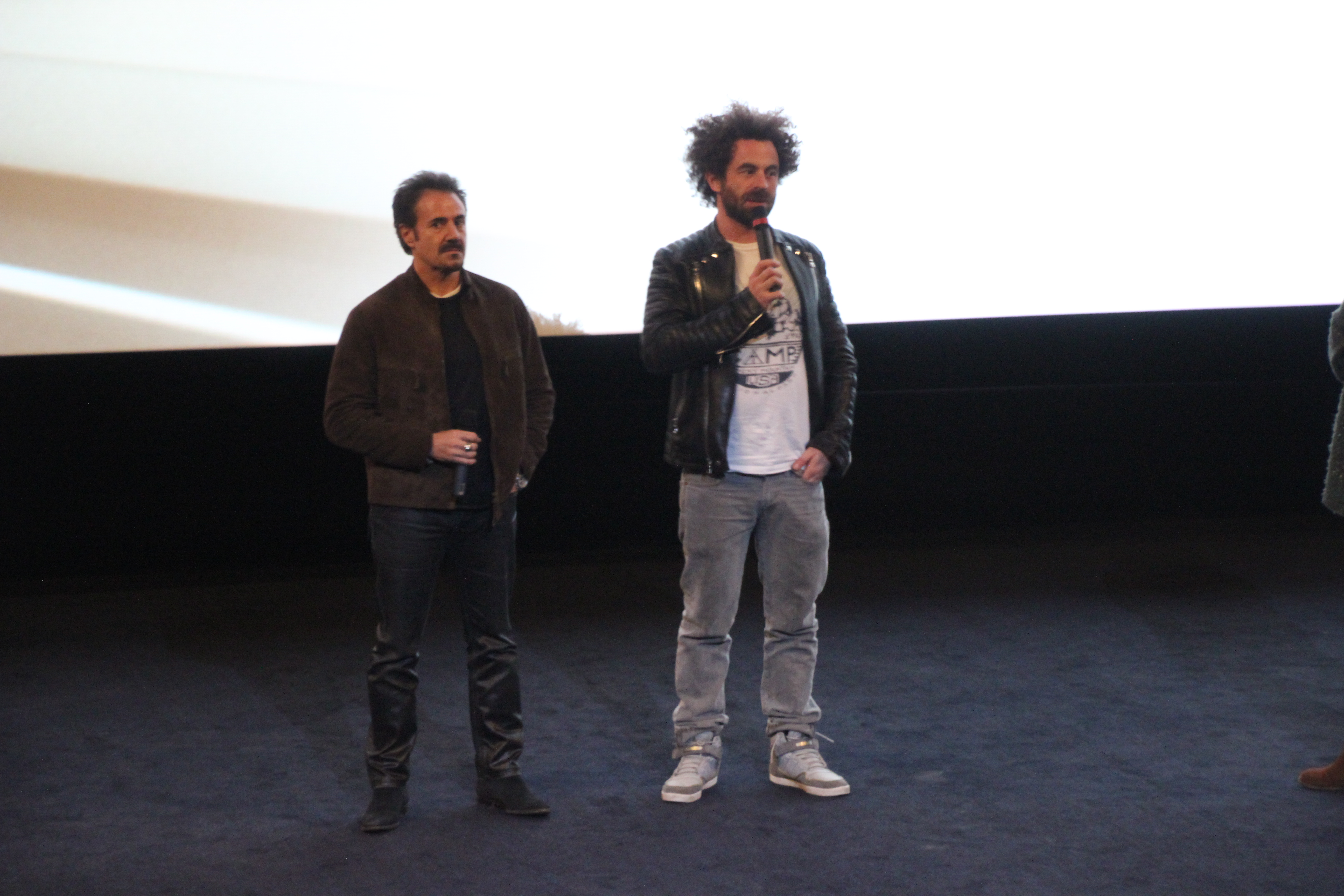 Nicolas Benamou José Garcia - ugc mondeville 18 novembre 2016 - a fond avant-premiere